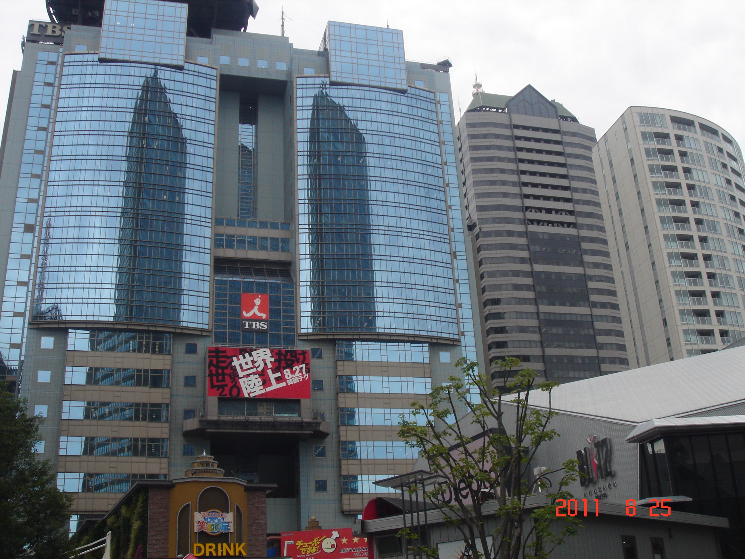 『夏サカス2011～笑顔の扉～』会期中の赤坂サカス。周りにTBS放送センター、赤坂BLITZなどが見える。